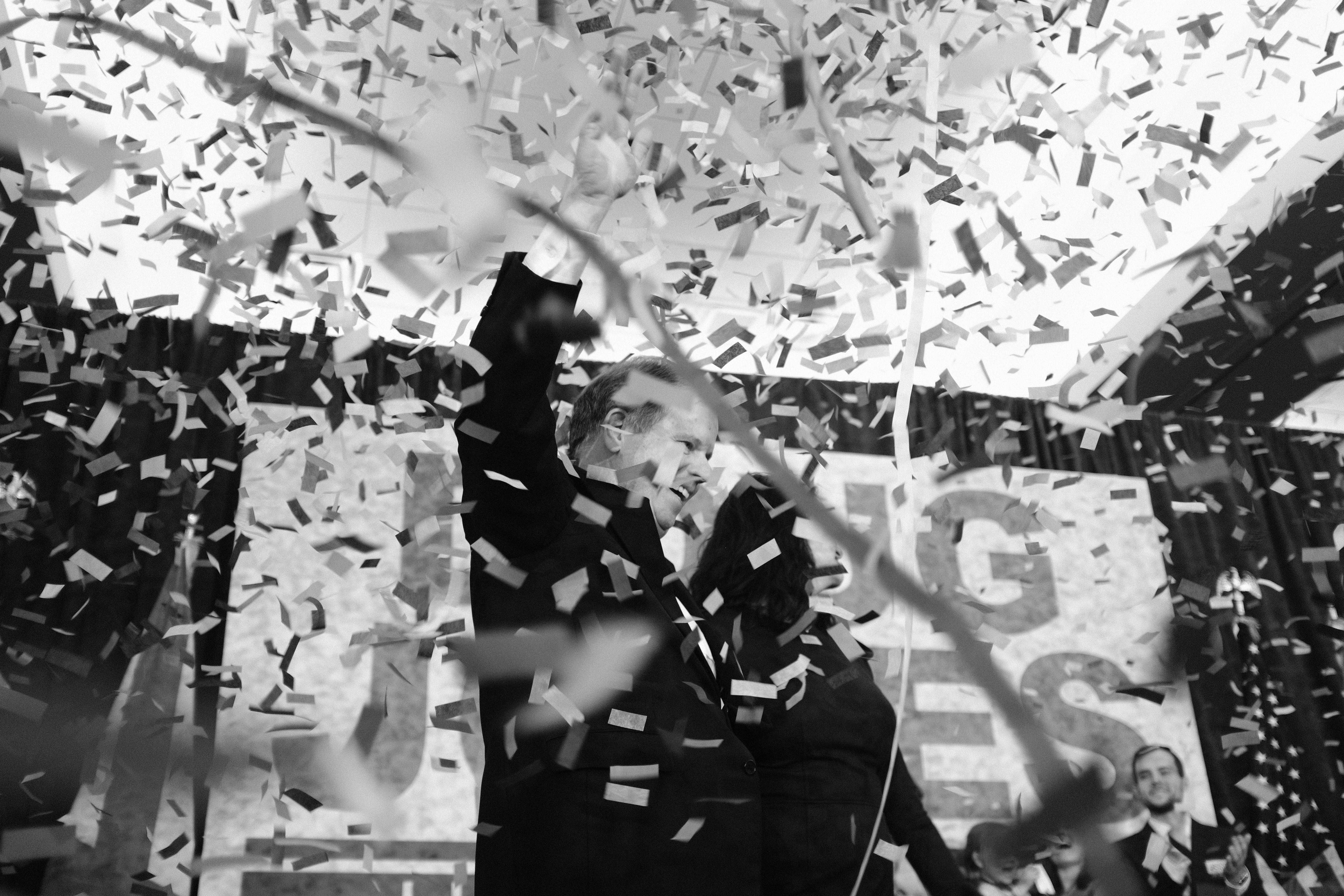 Fuji X100F "Acros" film simulation